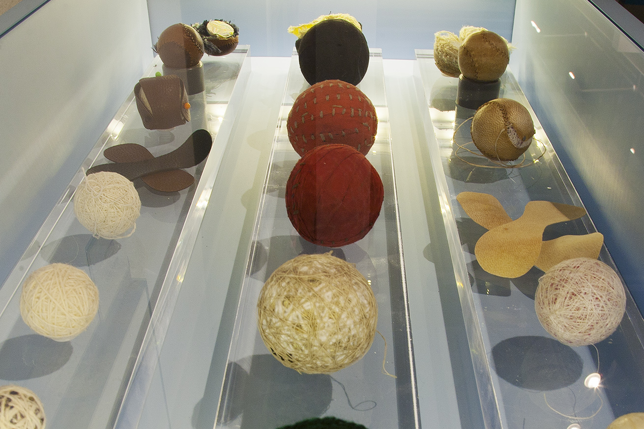 Fotografies d'Hèctor Juan de l'exposició temporal del Museu Valencià d'Etnologia "Faixa roja, faixa blava".